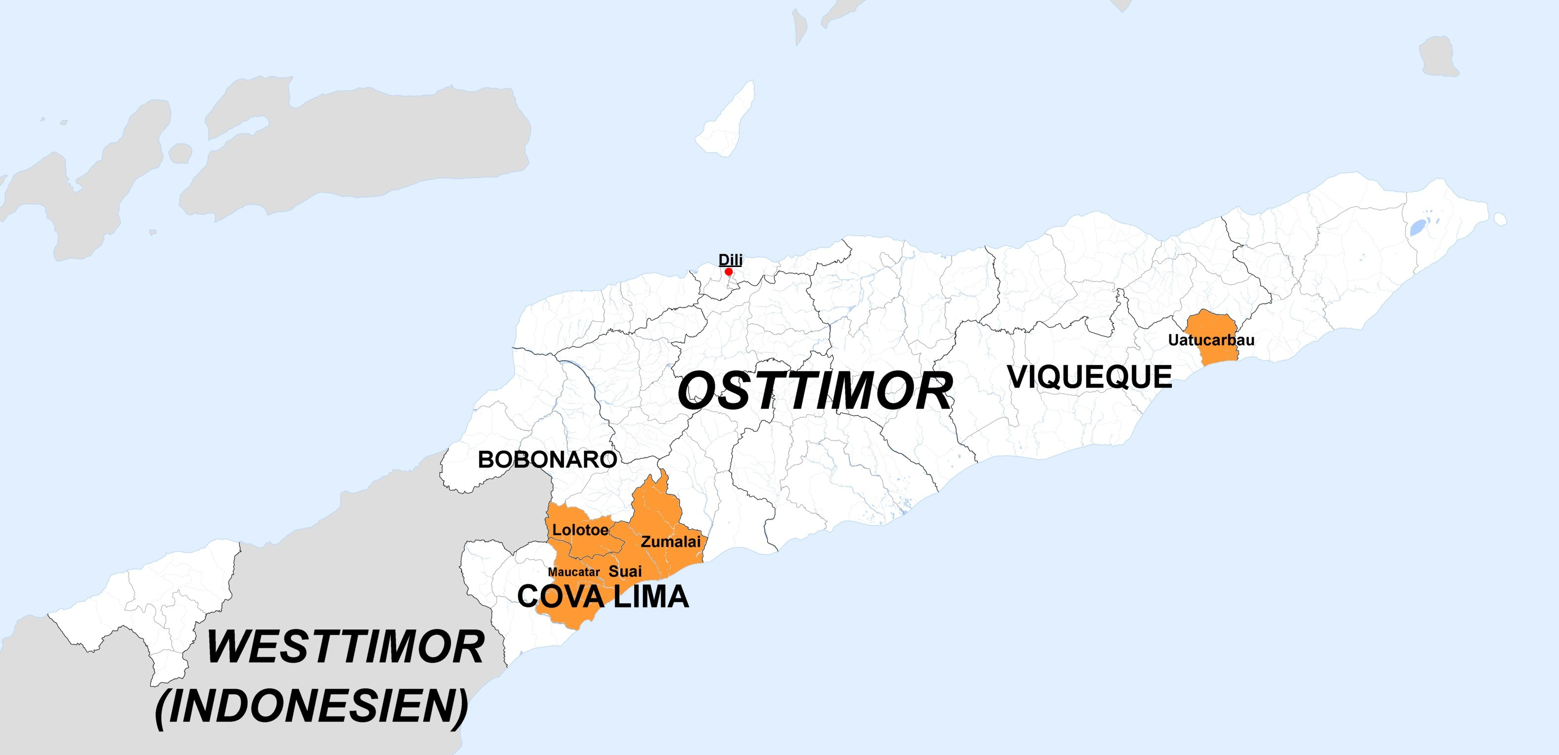 "Ninja"-Aktivitäten in Osttimor 2010, vgl. Wikinews: „Ninjas“ in Timor-Leste?